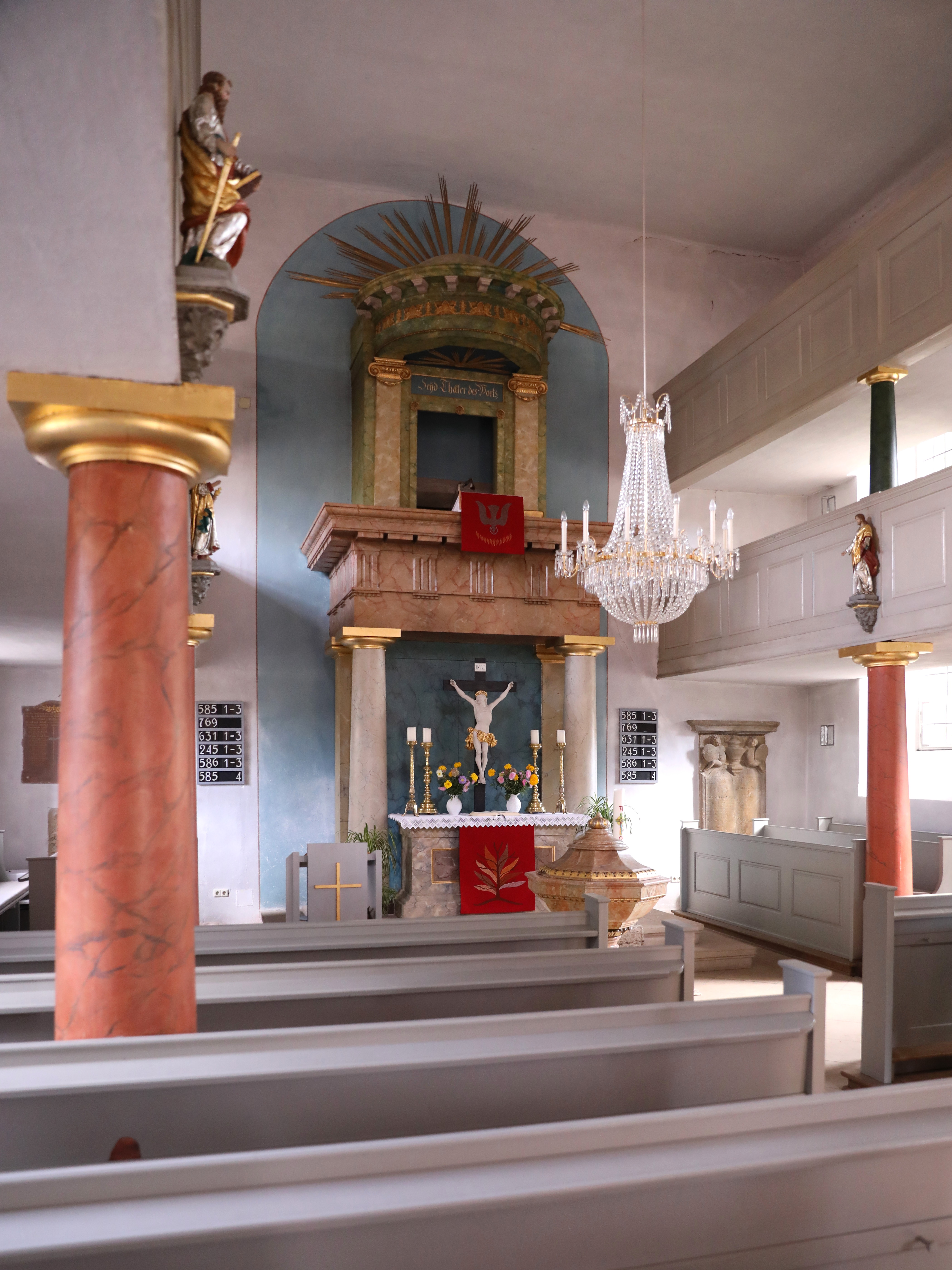 Evangelisch-lutherische Pfarrkirche Gleußen, 1836. Tag des offenen Denkmals.